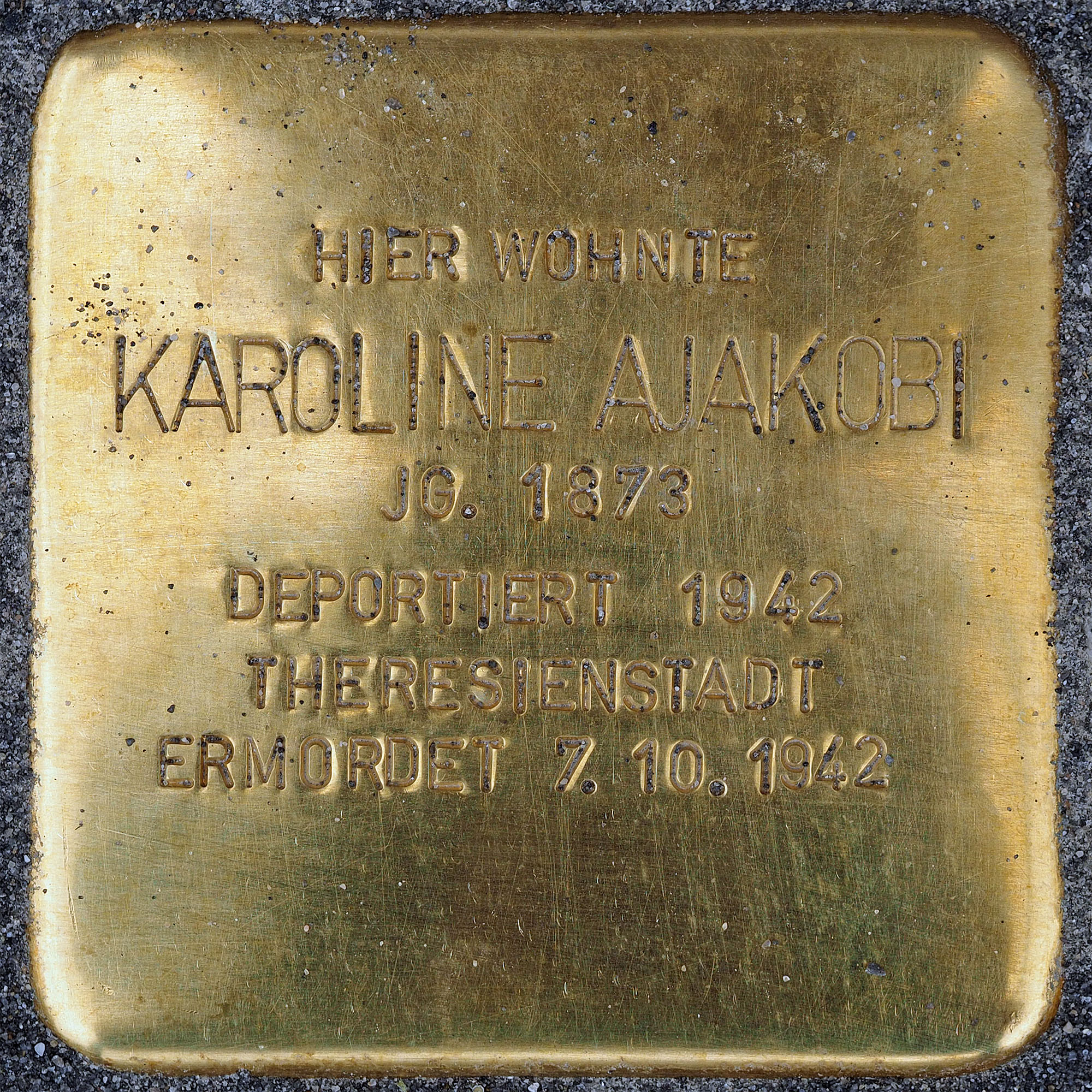 Stolpersteine Kempen: Ajakobi, Karoline